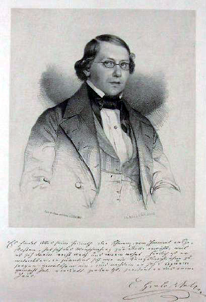 Carl Herloßsohn